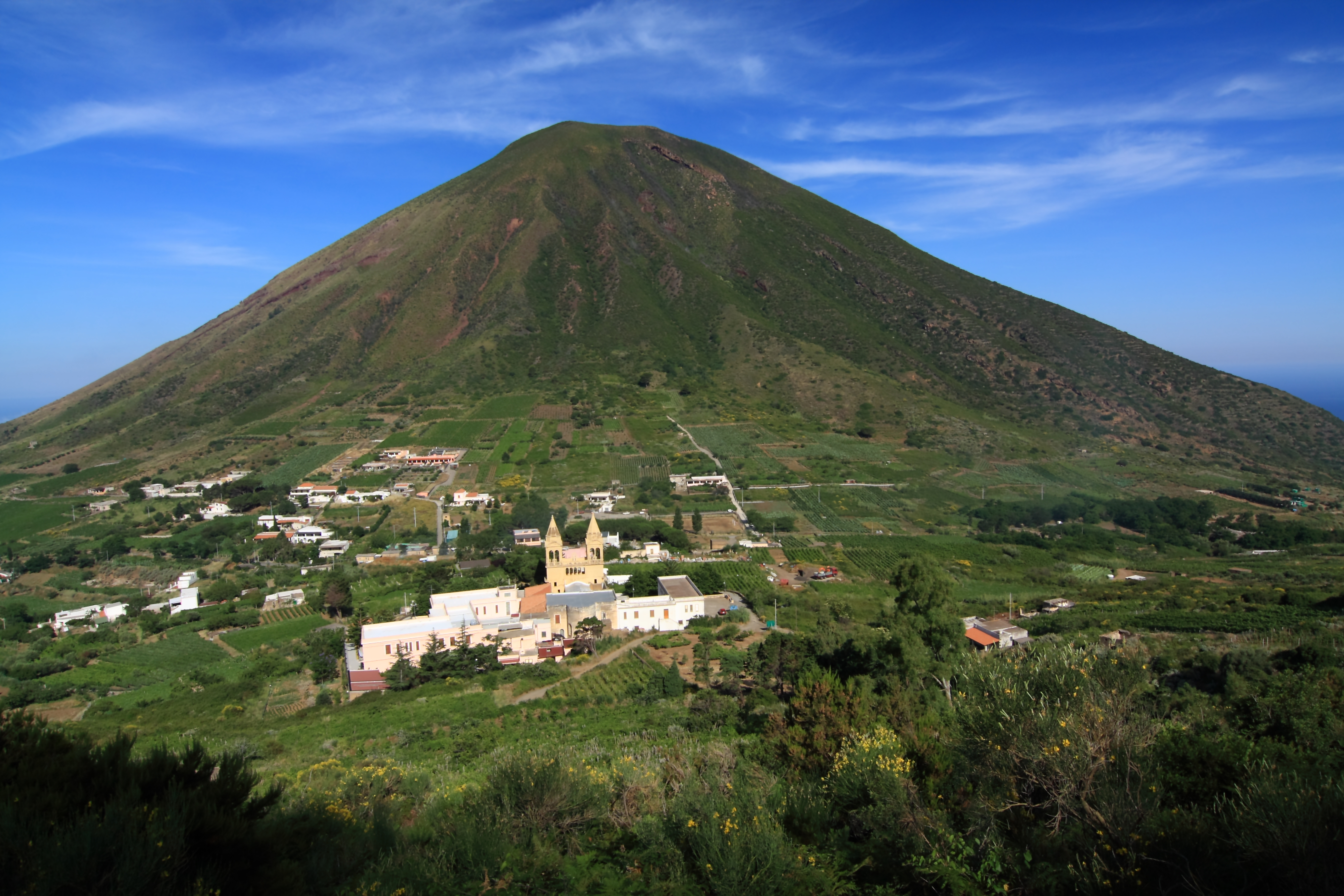 Isola di Salina Vedere su nero